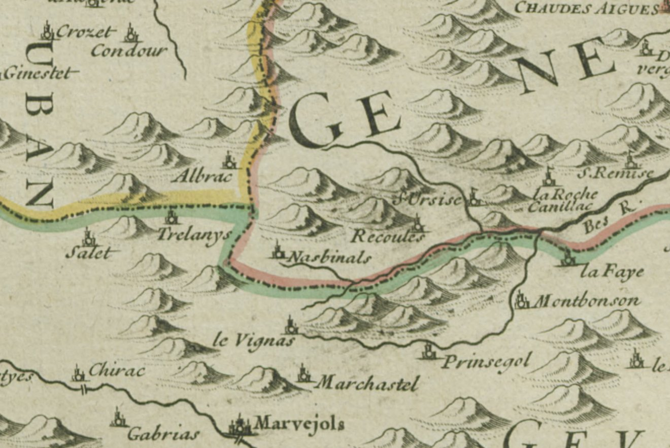 Carte de Nasbinals et des environs au XVIIIe siècle